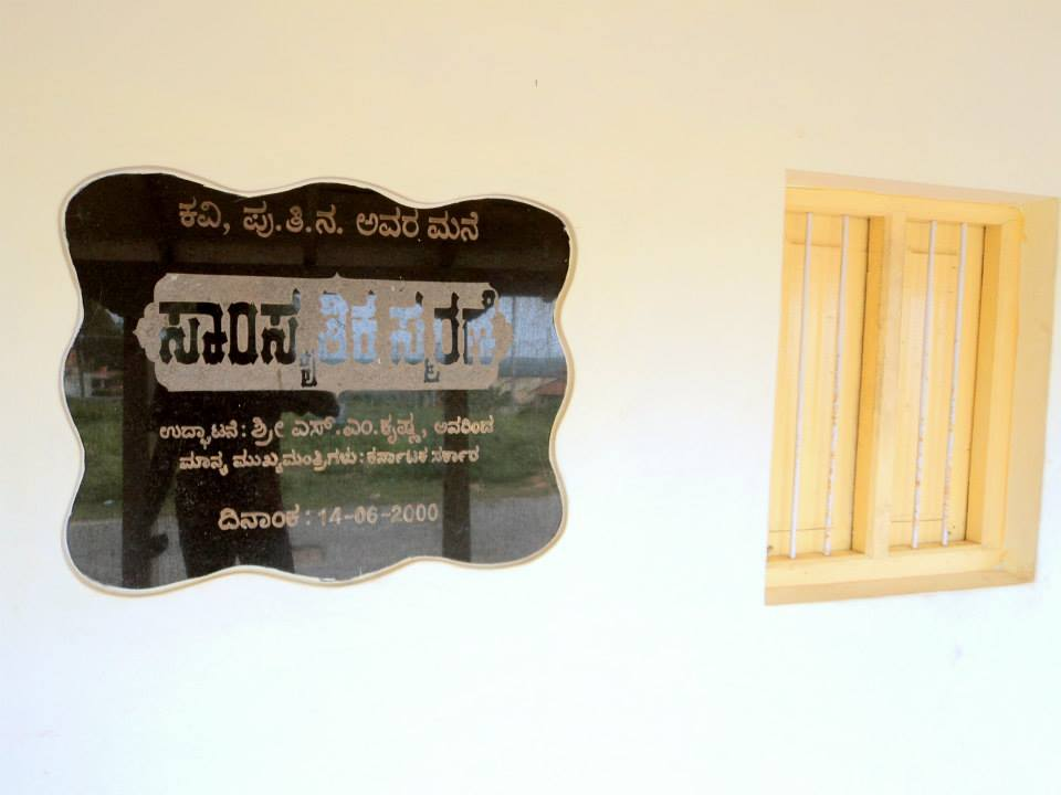 ಕನ್ನಡ: ಪುತಿನ ಮನೆ 2